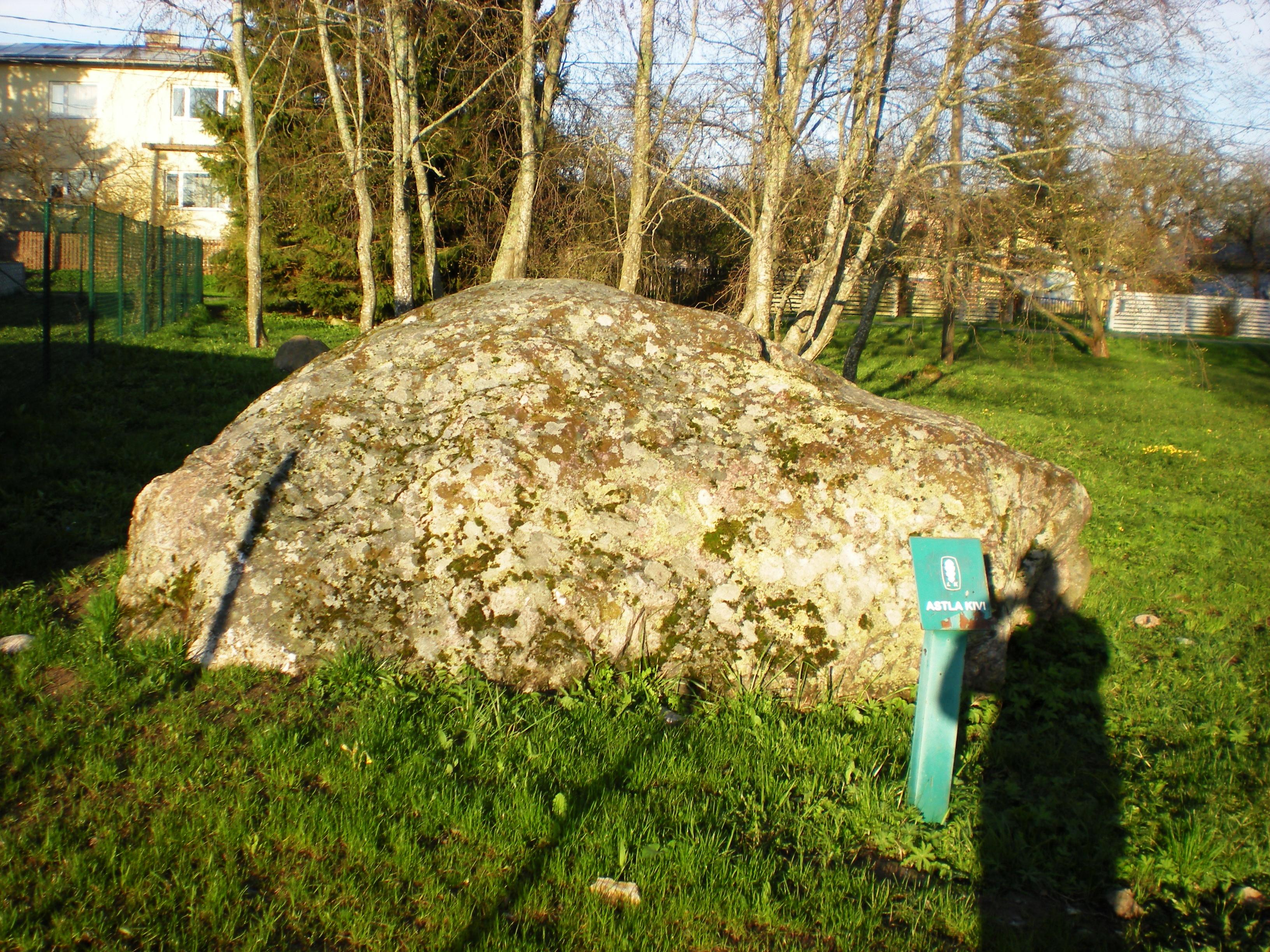 Astla kivi